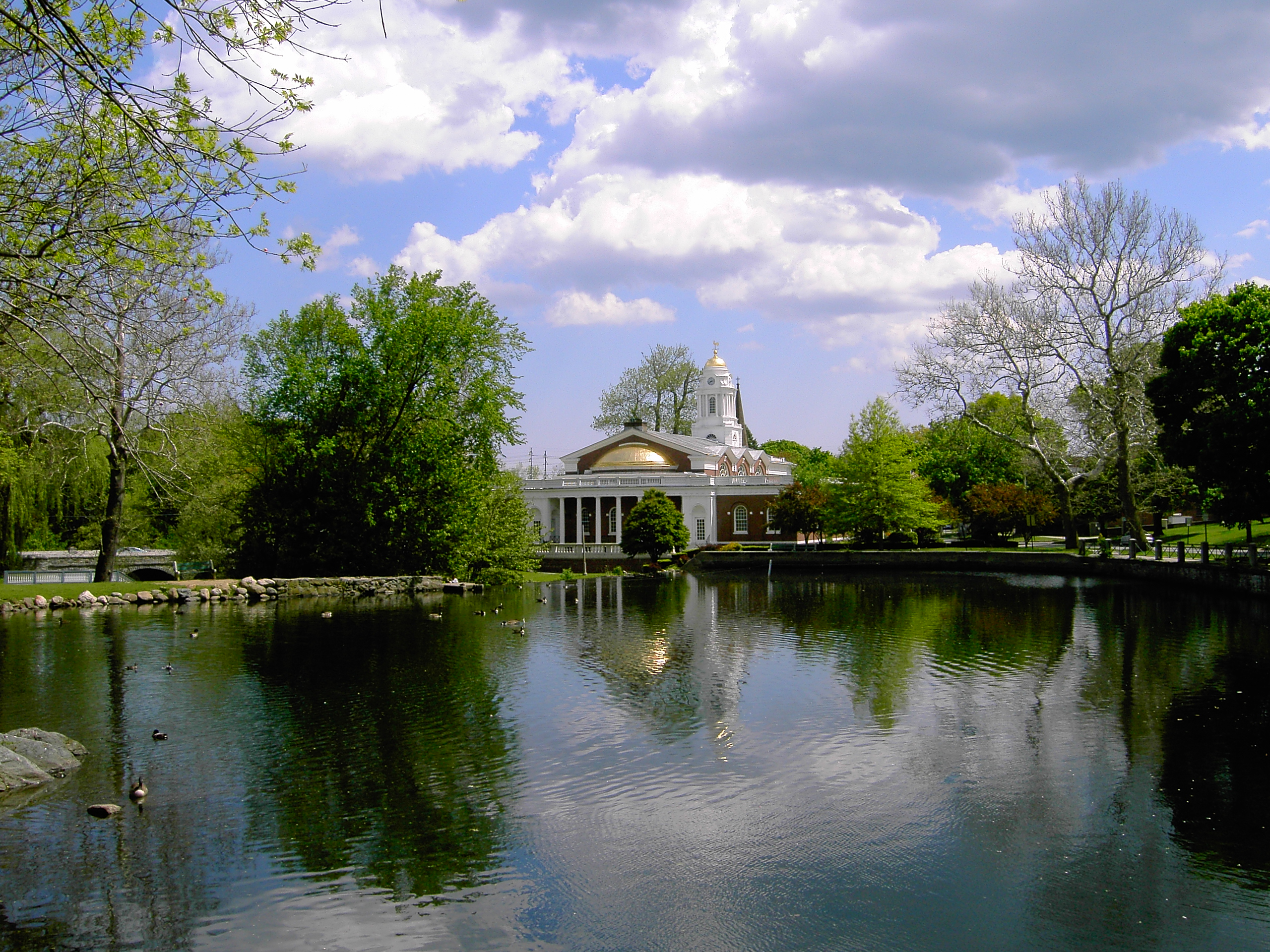 Milford (Connecticut), Rathaus